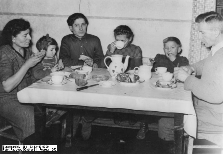 Löbersdorf, Abendessen einer Bauernfamilie ZB-Paalzow 1.2.1952 Meisterbauer Schimke aus Löbersdorf bei Bitterfeld. (siehe Begleittext). UBz: Nach der Arbeit schmeckt das Essen doppelt gut.